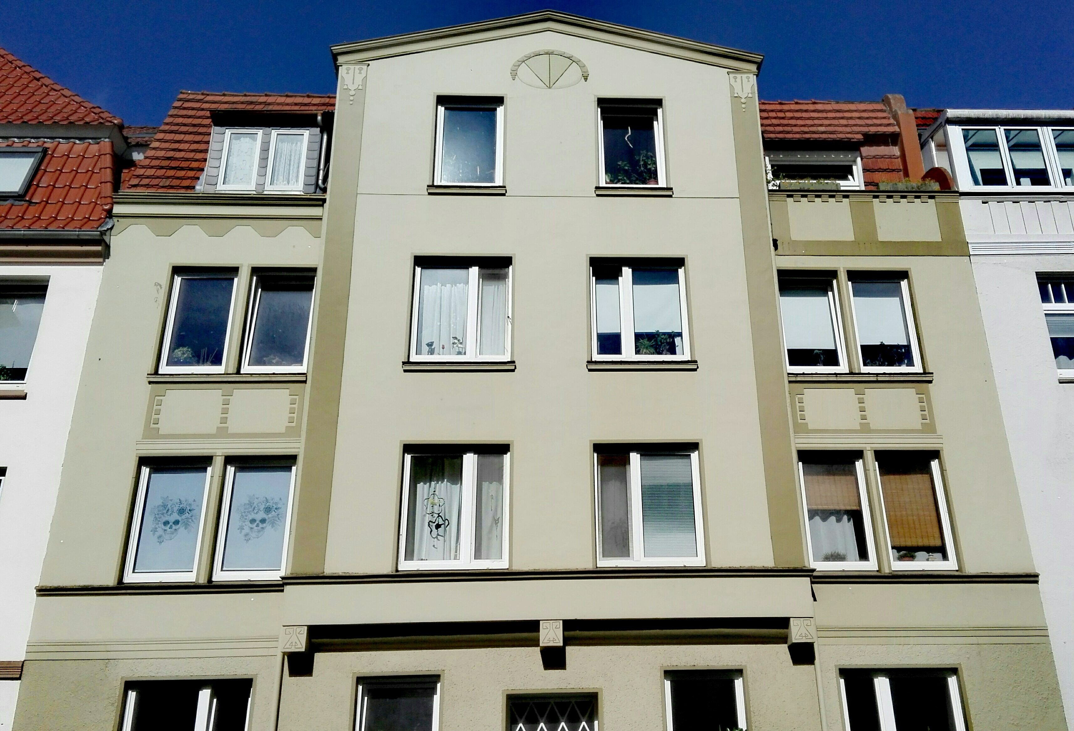 Einstiger Wohnsitz der Familie Hoff in der Morkerkestraße 15, I. Etage.